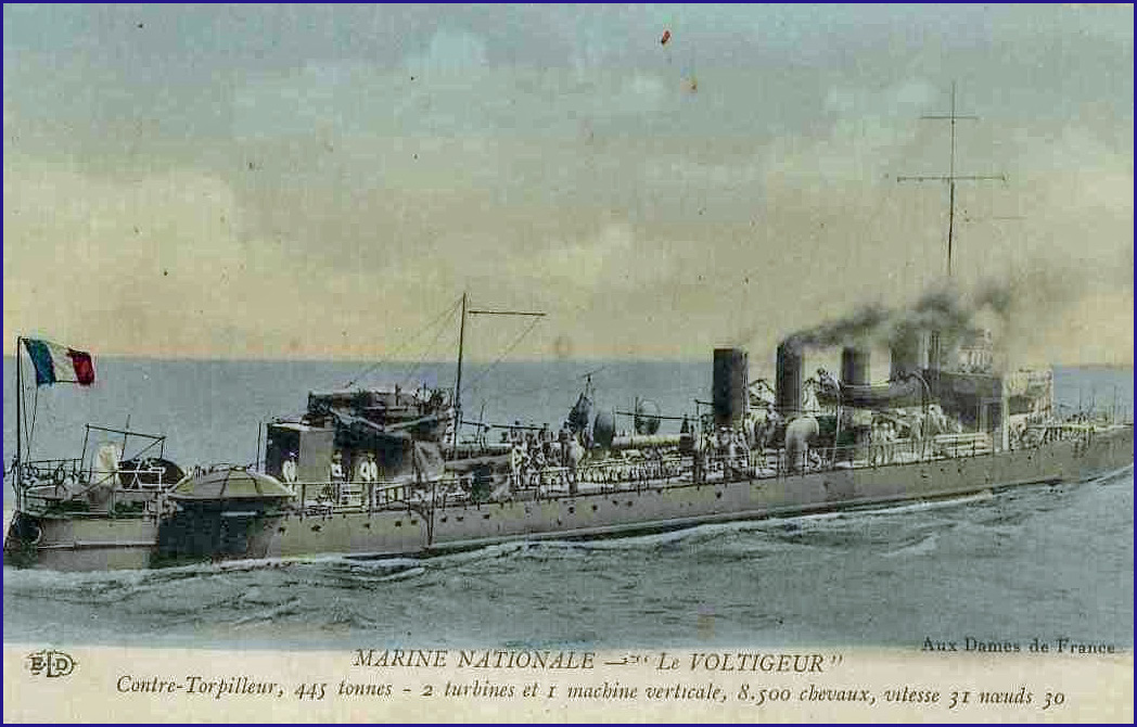 Destroyer Le Voltigeur (1908)